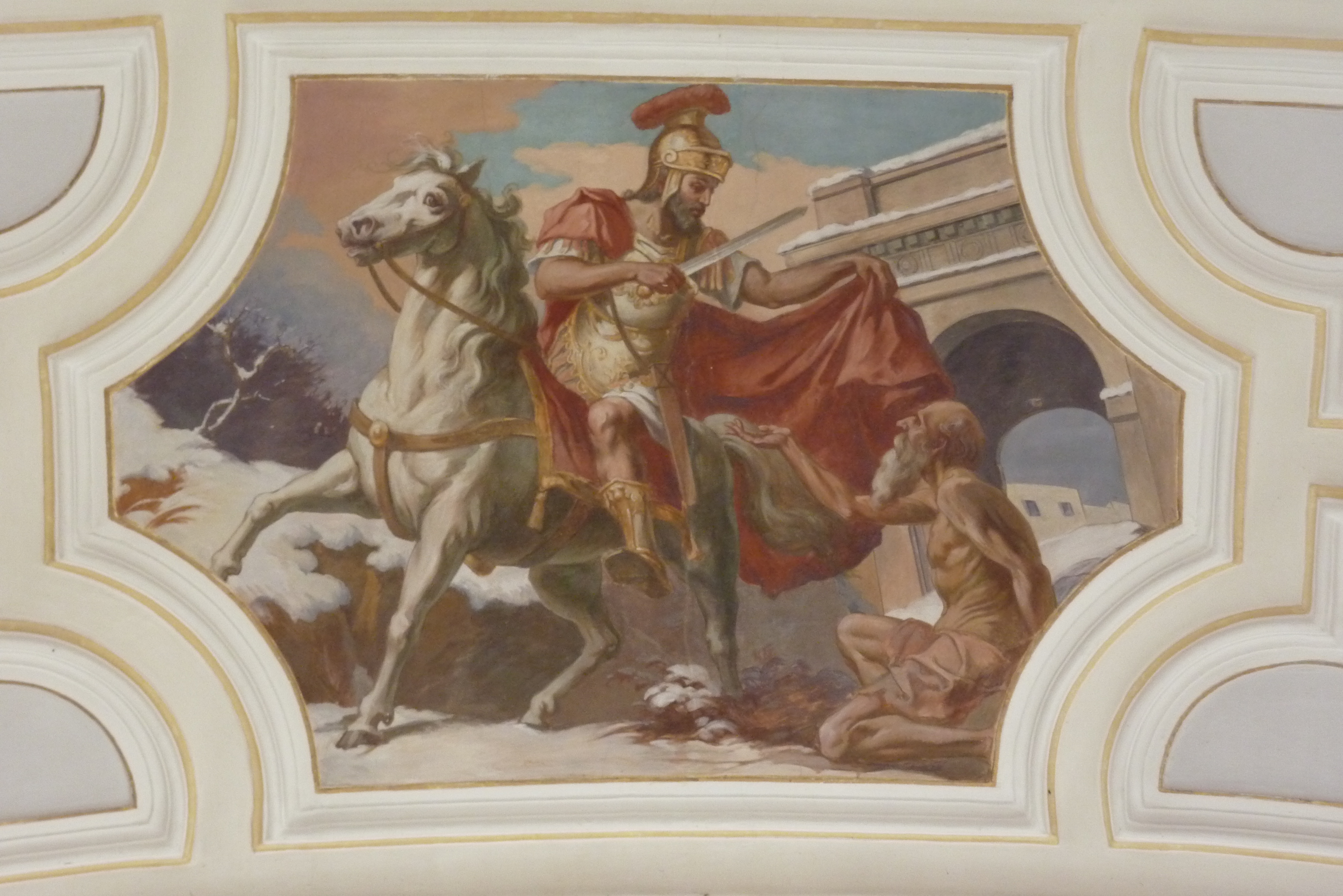 Katholische Pfarrkirche St. Martin in Blindheim (Landkreis Dillingen an der Donau), Deckenbild des Chores von 1908 von Leonhard Thoma, Darstellung des hl. Martins, der seinen Mantel mit einem Bettler teilt